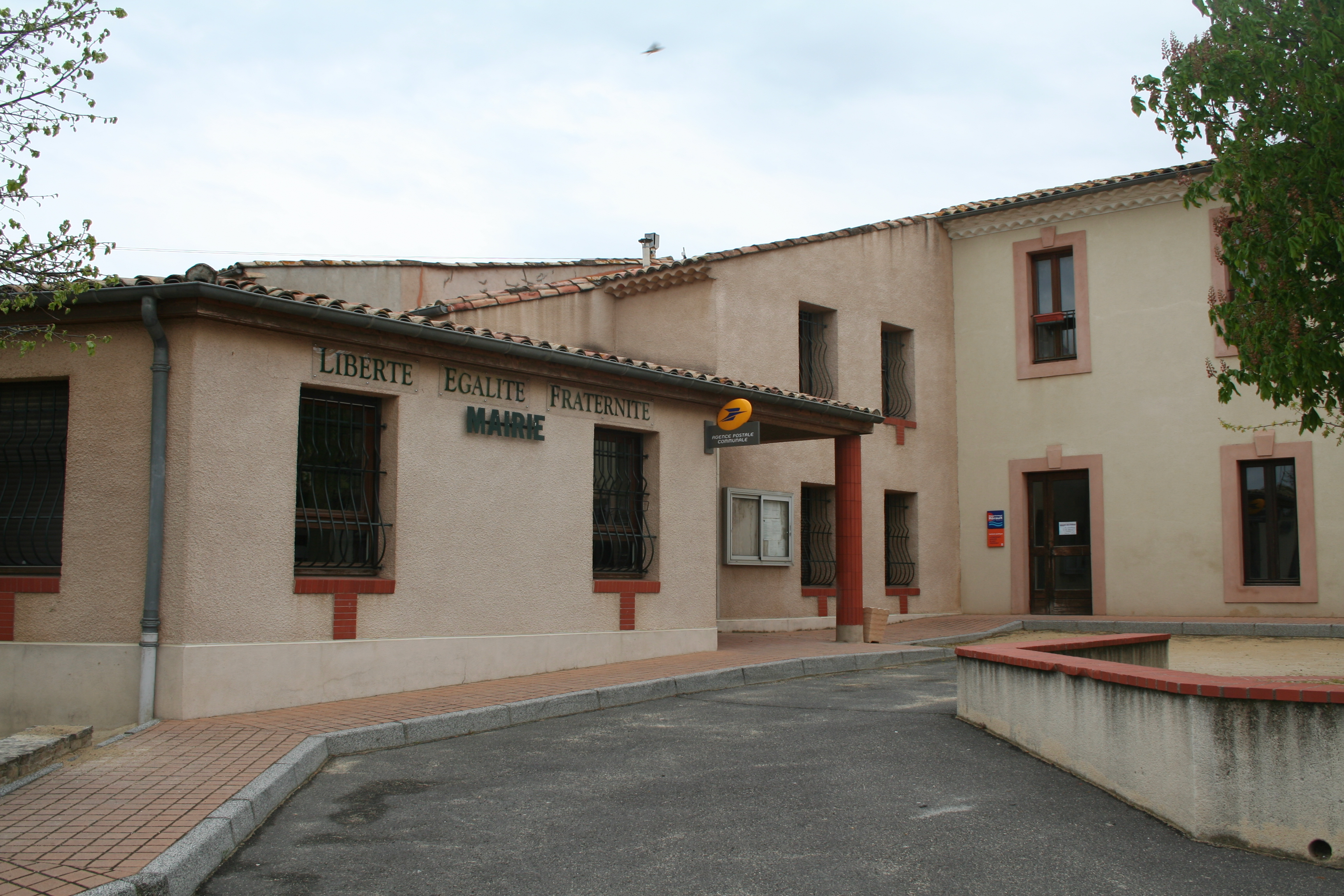 Neffiès (Hérault) - mairie.